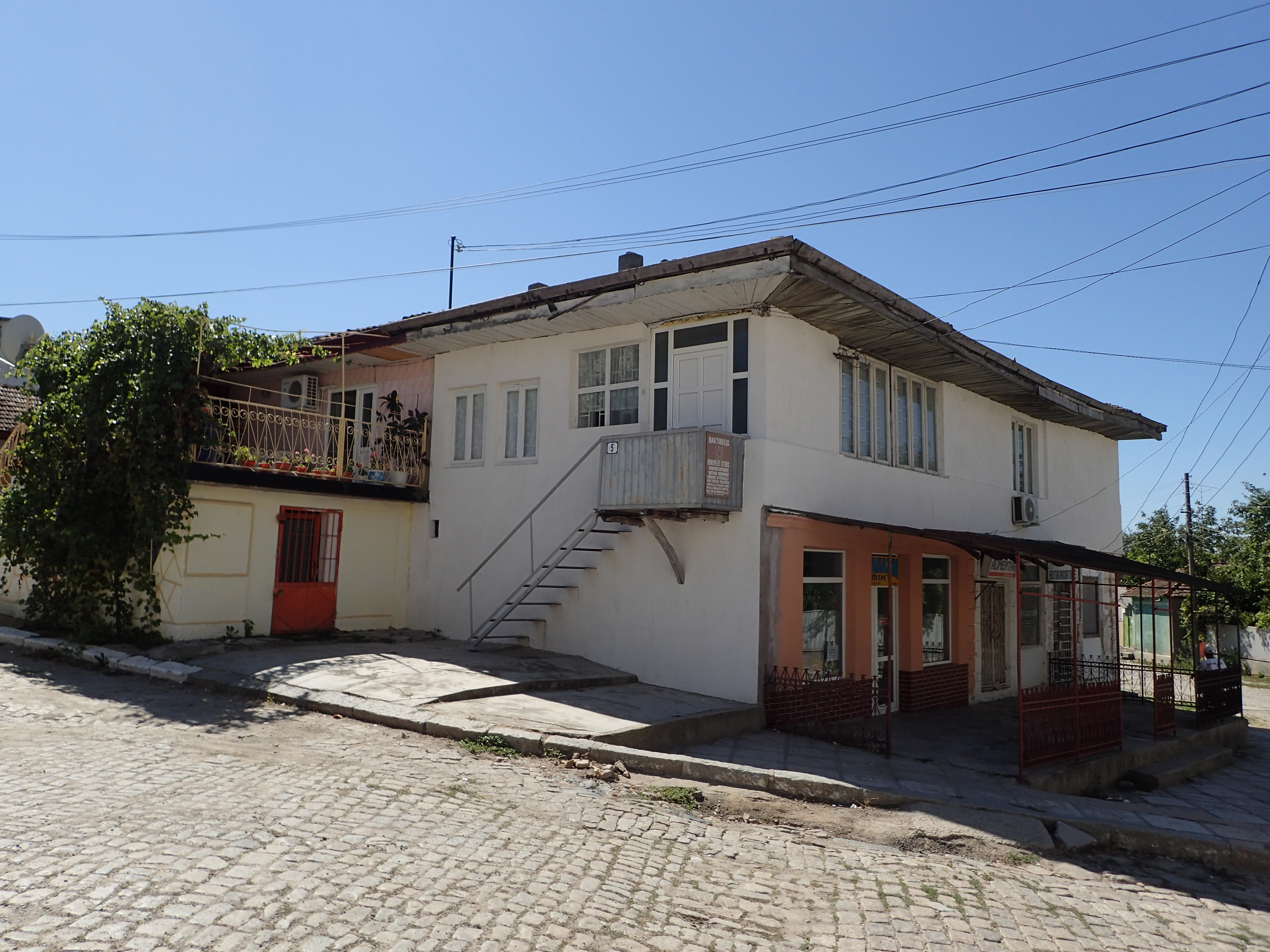 Fost han